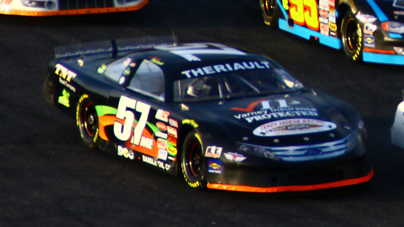 Austin Theriault au Circuit Riverside Speedway Ste-Croix en 2011 - Photo Paul-Émile Poulin-Jacques